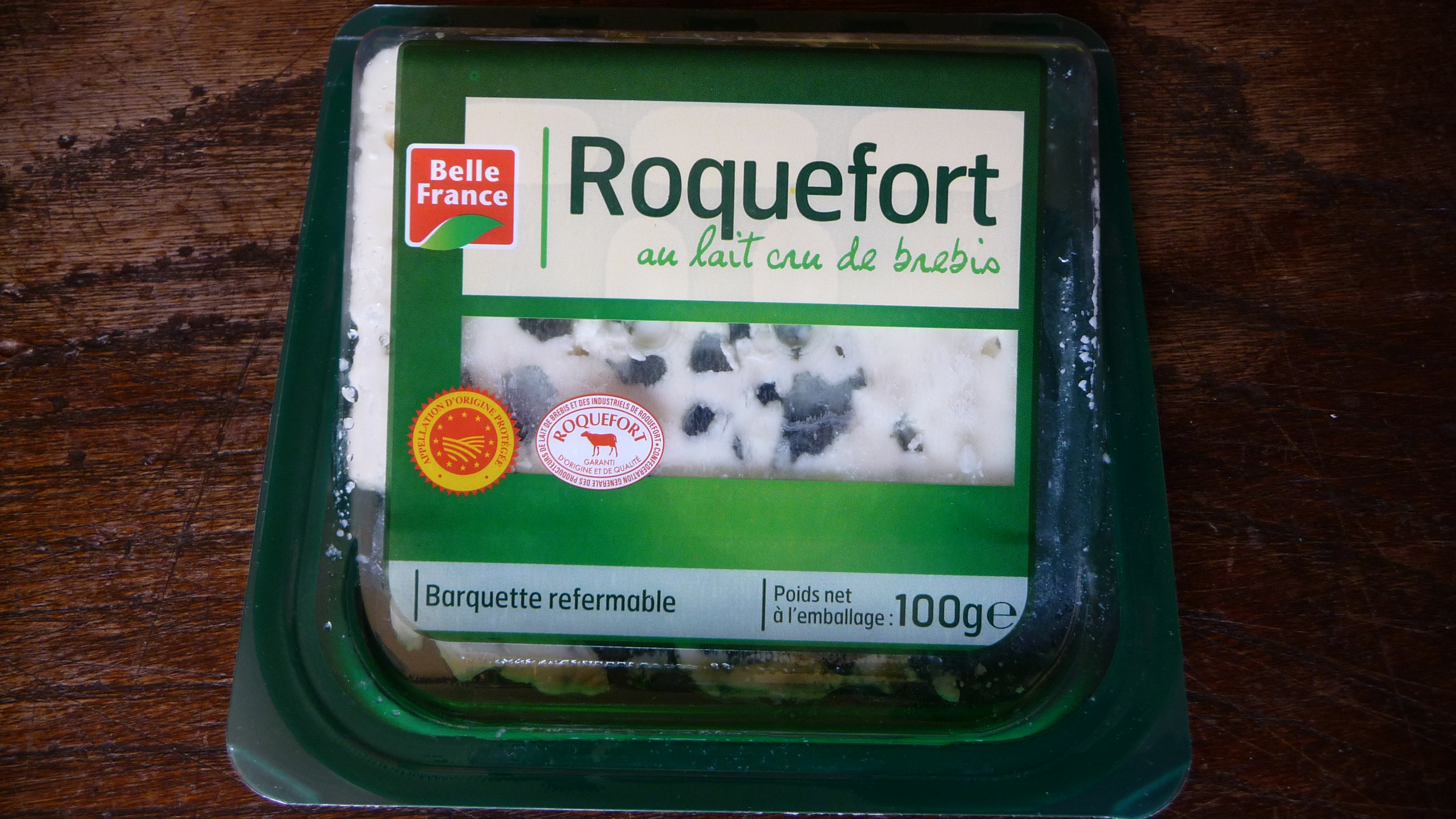 Tranche de fromage de Roquefort dans un emballage de matière plastique_ marque commerciale de grande distribution